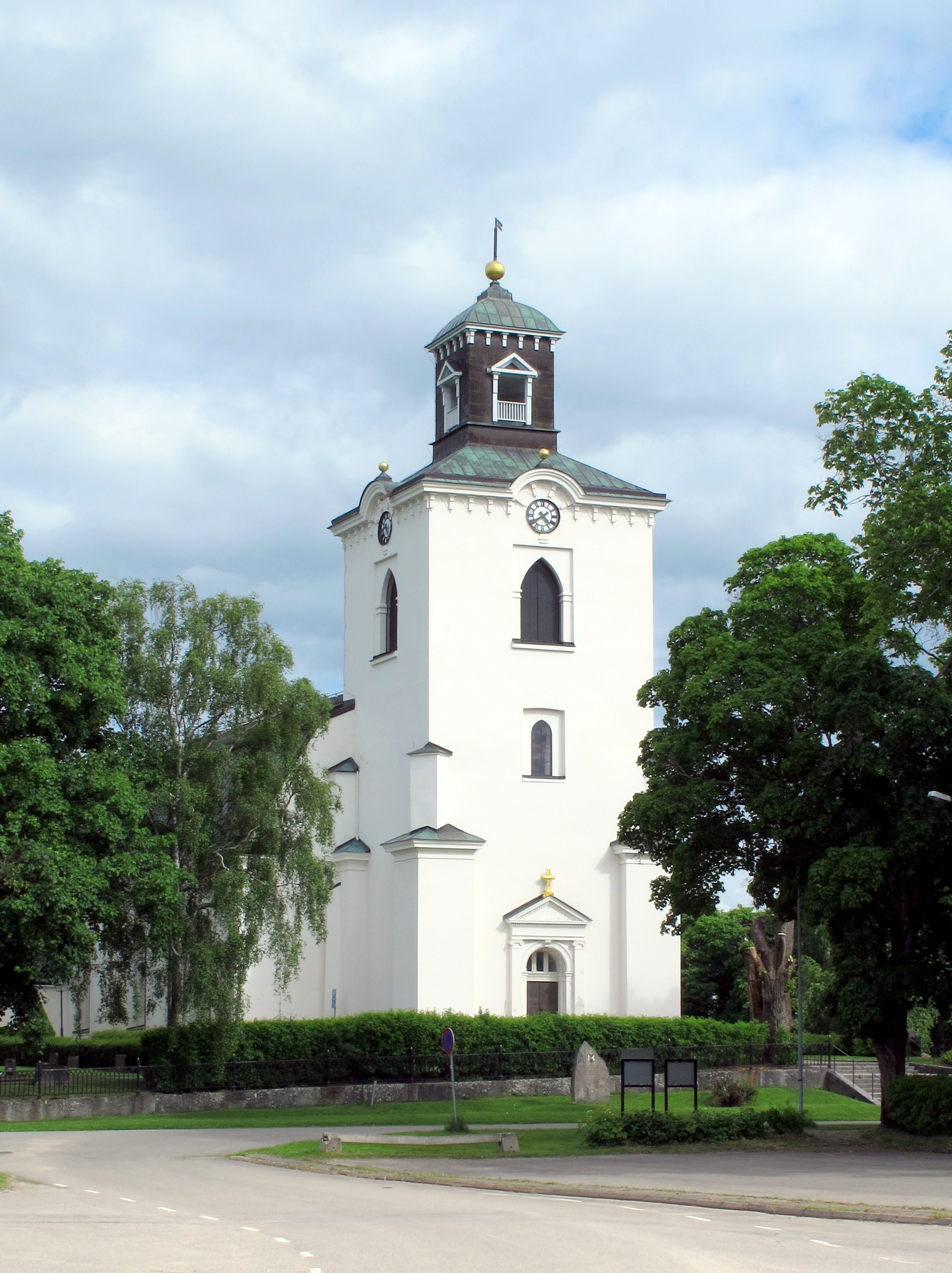 Alfta kyrka